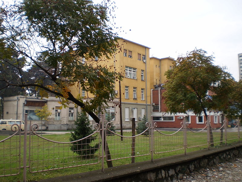 Зграда интерног одељења Клиничког центра у Нишу. Аутор МилеМД, 17/10/2010.